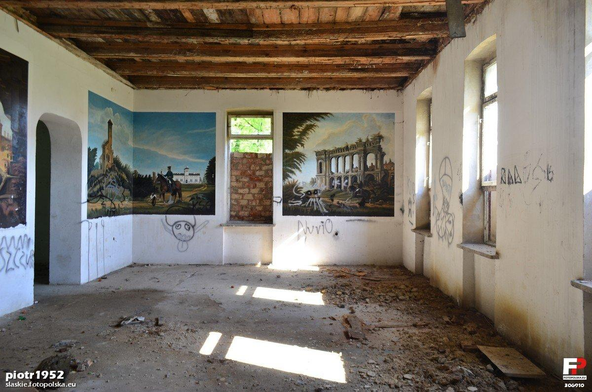 Malowidła